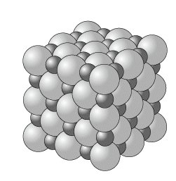 Kristallstrukturtyp "Natriumchlorid"